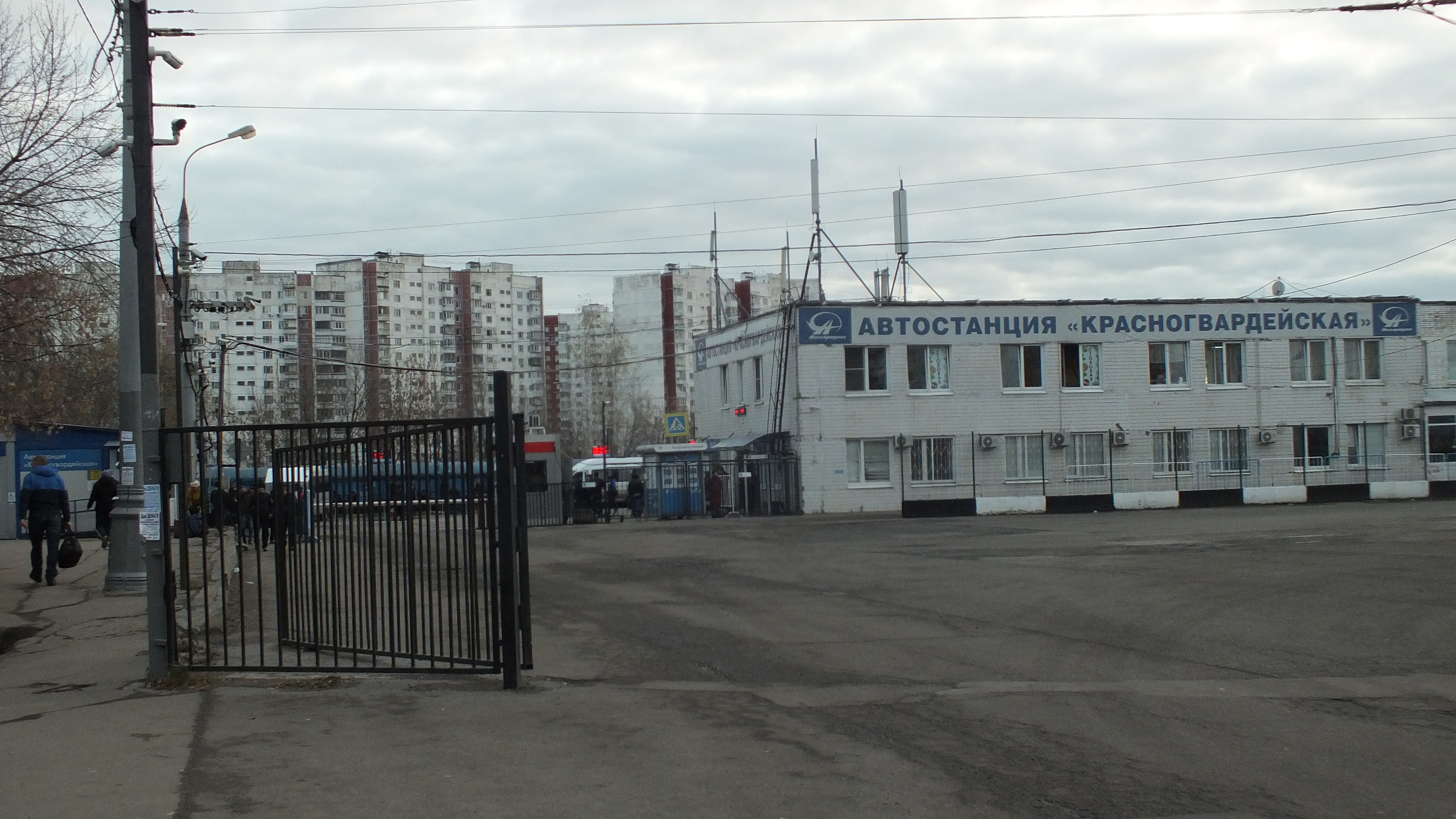 Автостанция «Красногвардейская» 2 ноября 2019 года